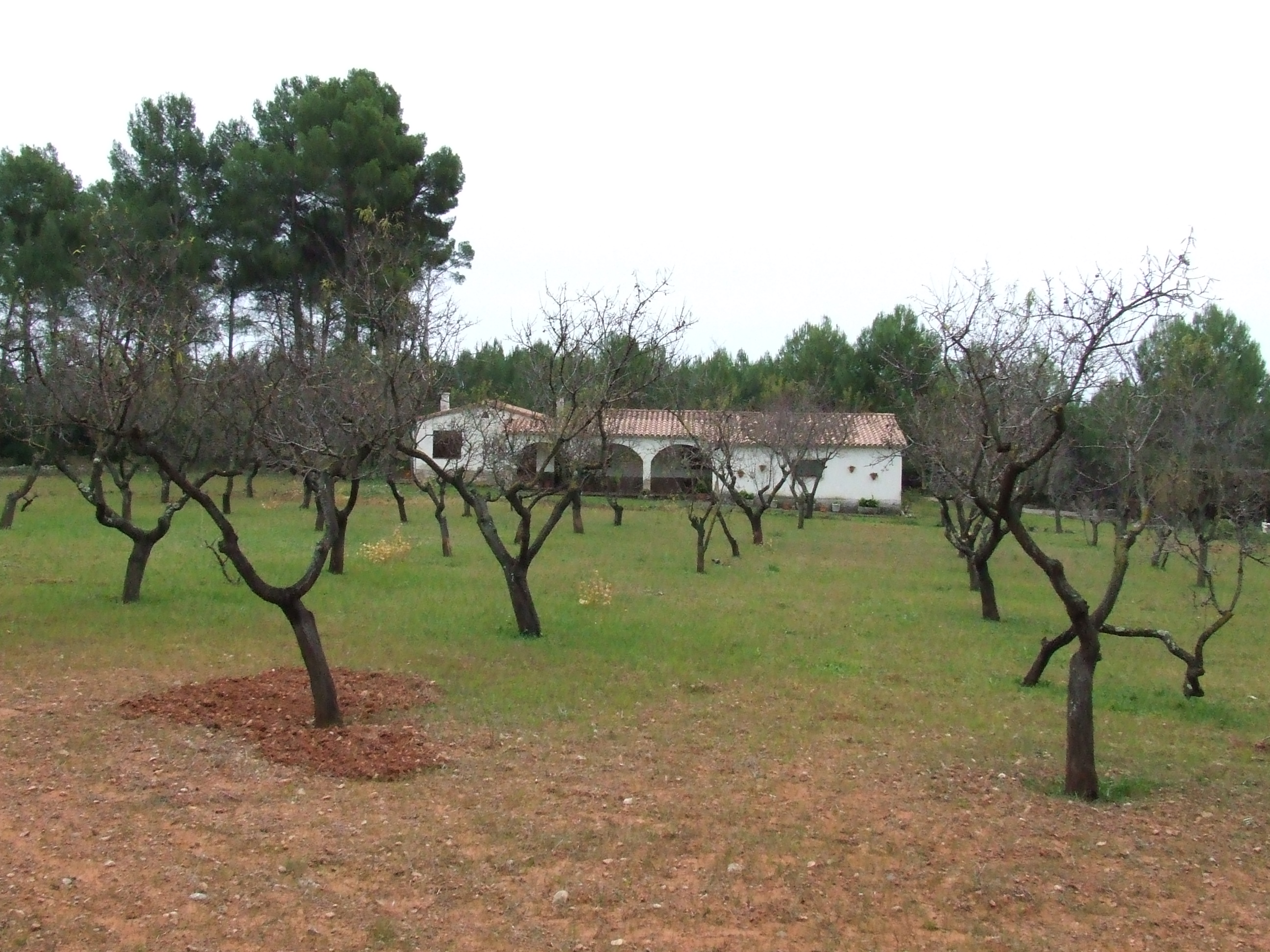 Can Mimeri (Riells del Fai, Bigues i Riells, Vallès Oriental)